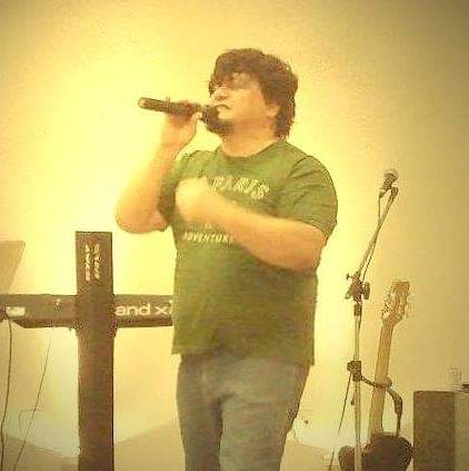 Ex vocalista do Oficina G3